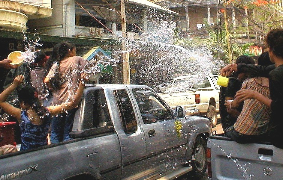 La fête de Songkran (Nouvel an bouddhiste) au Laos Prise de vue personnelle Vientiane 2002 Publiée également sur site personnel : fr: Siren 5 avr 2005 à 12:02 (CEST)